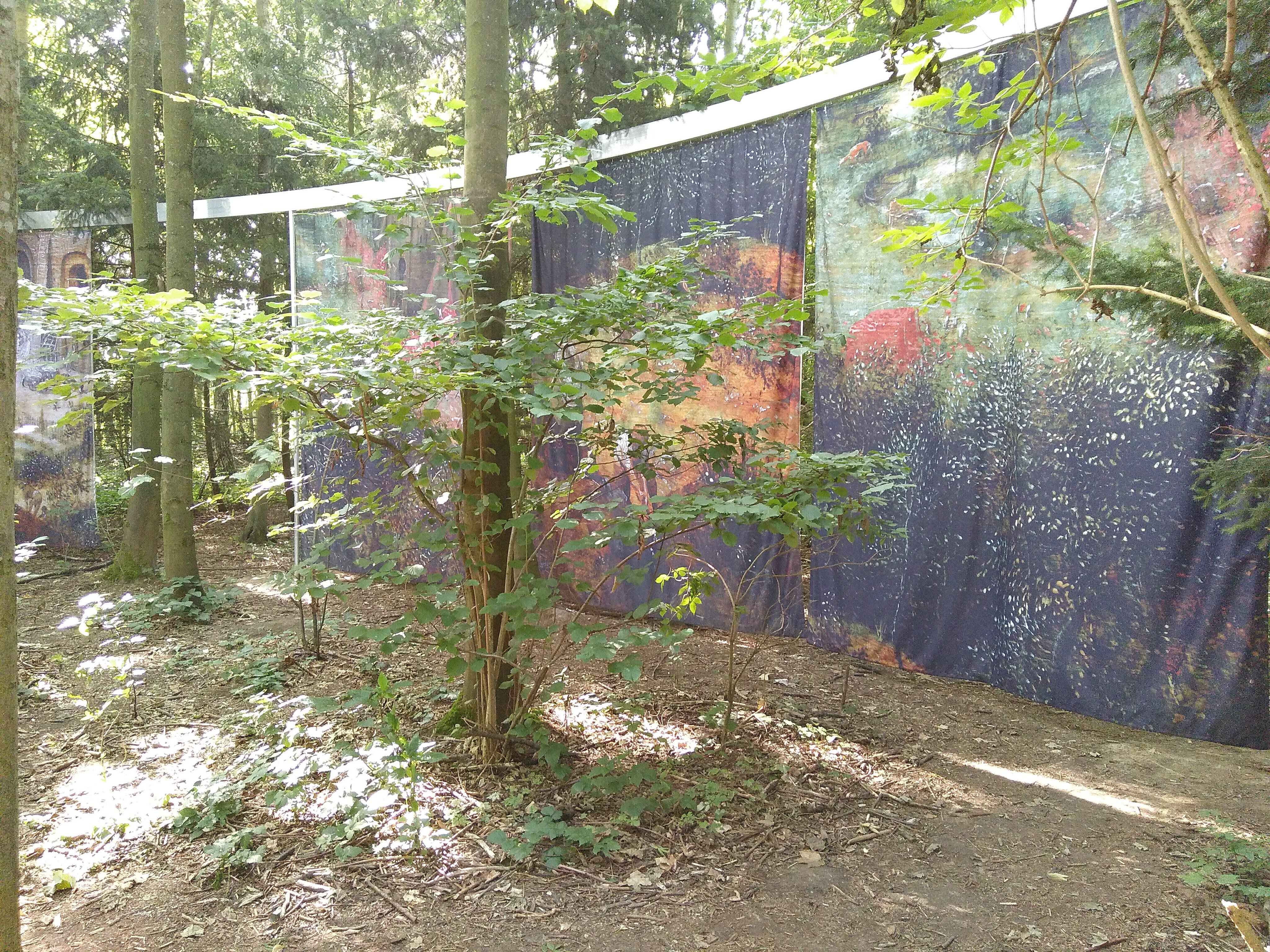 Werk van het architectenbureau OFFICE Kersten Geers David Van Severen en fotograaf Bas Princen